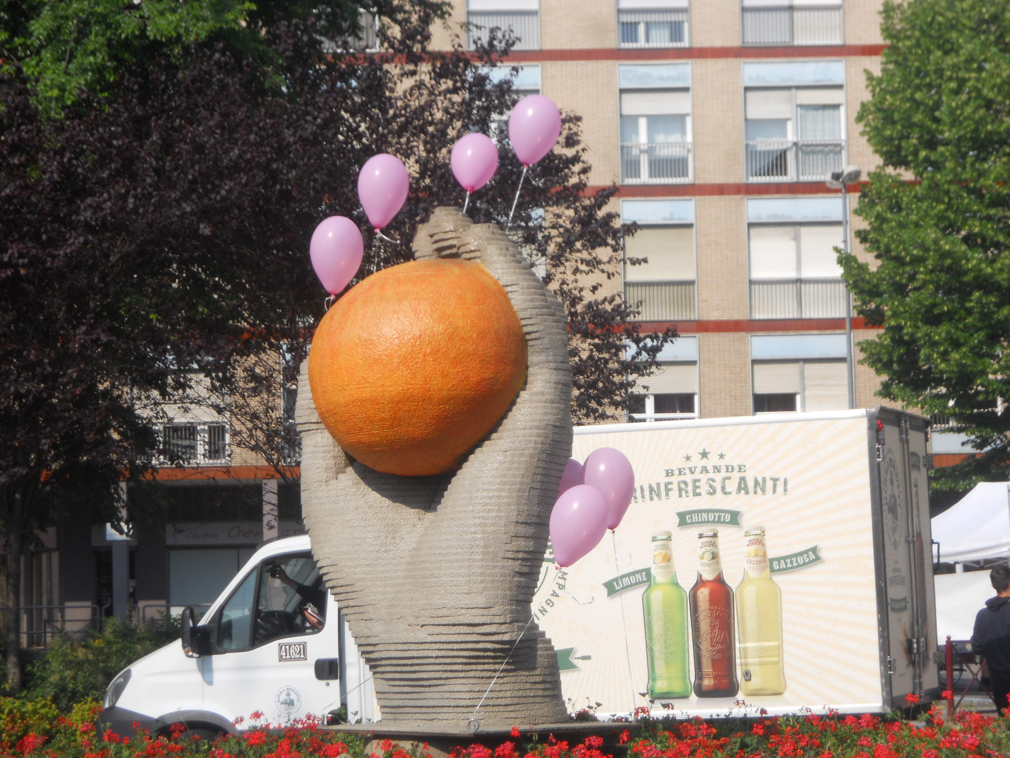 Mano con arancia - 2012 - Design and realization by Silvia Barbiroglio and Davide Morando